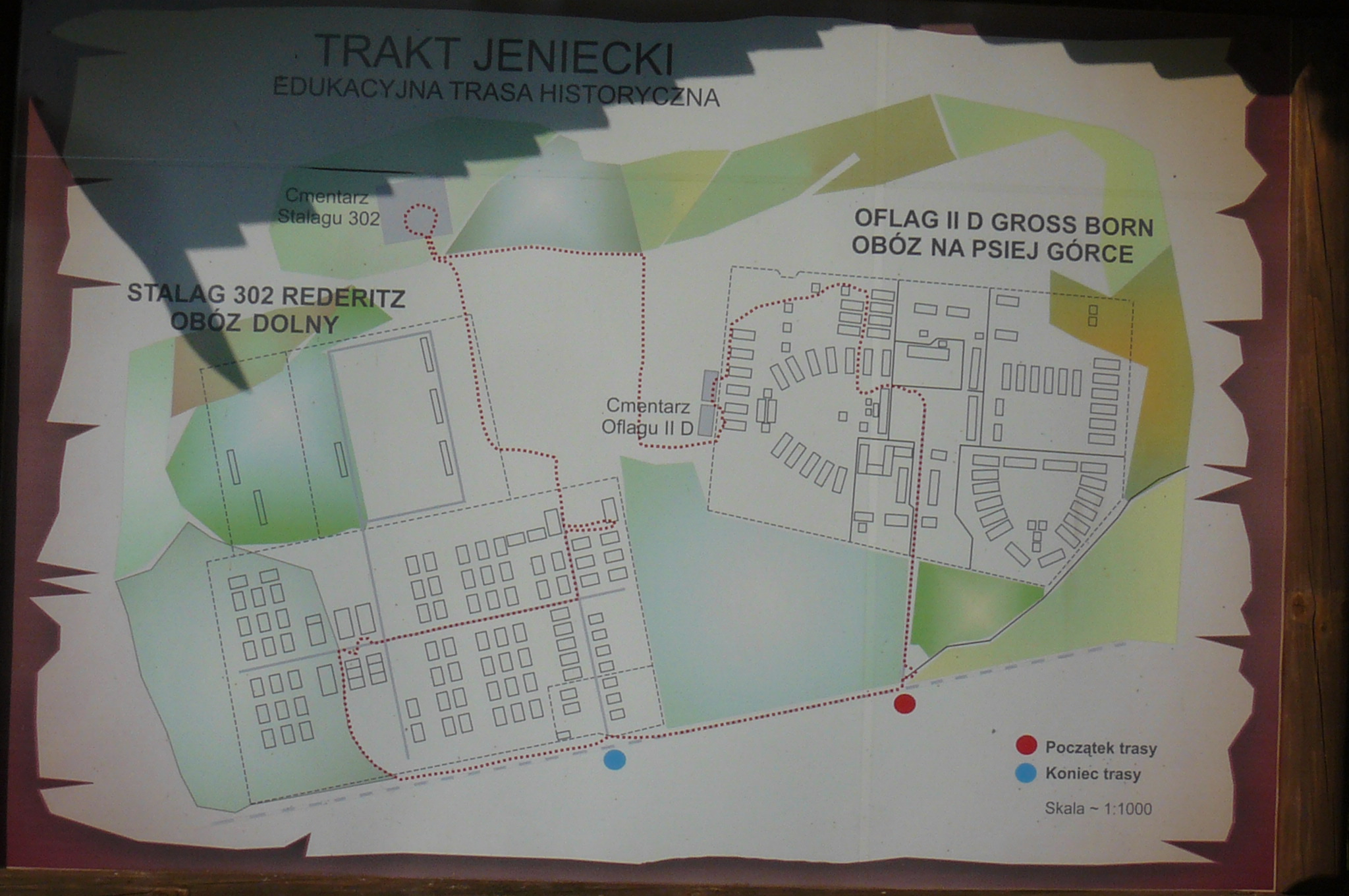 Dawny Oflag Gross Born - Kłomino.